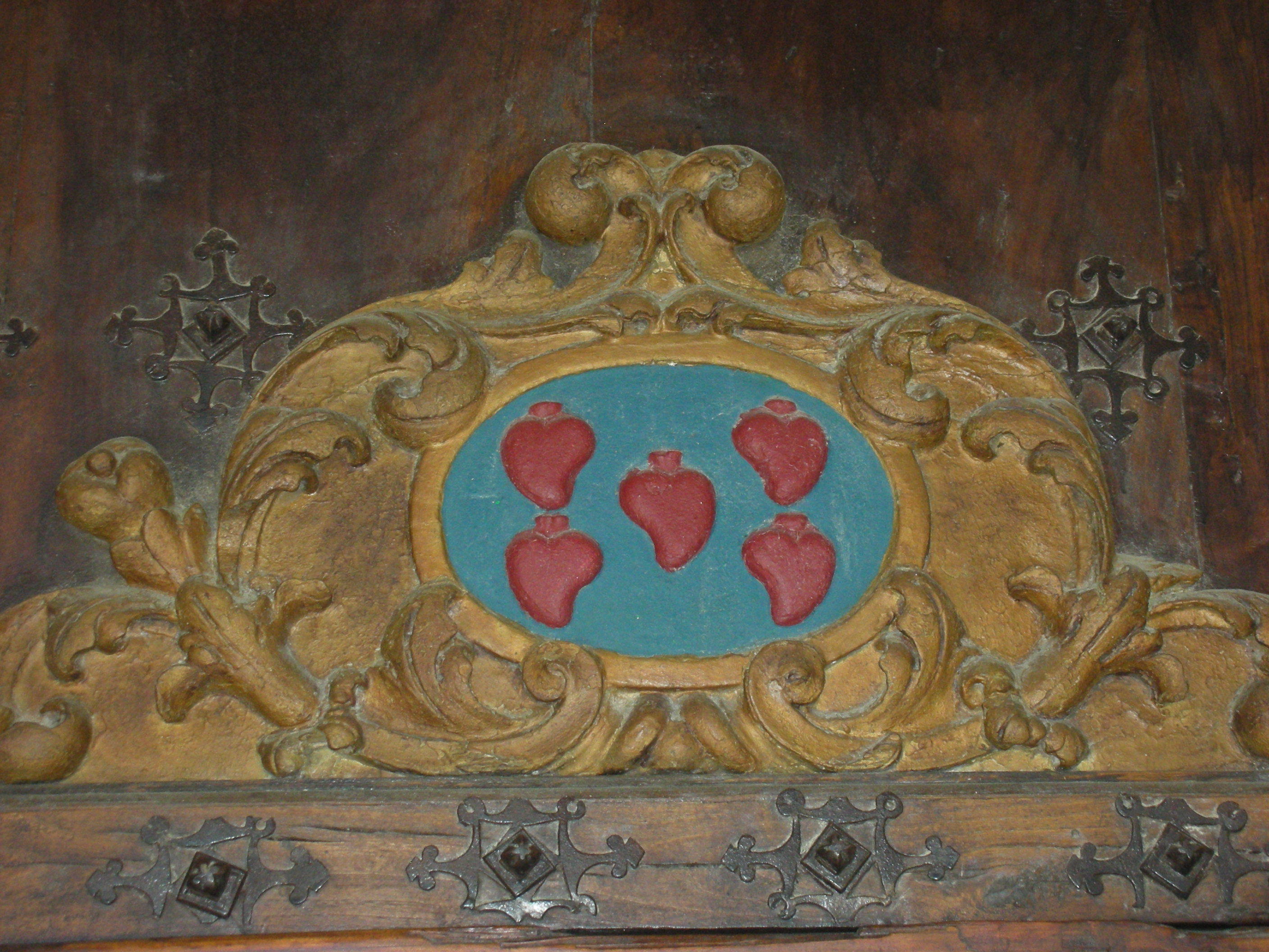 Escudo del municipio de Betelu, Navarra, España.